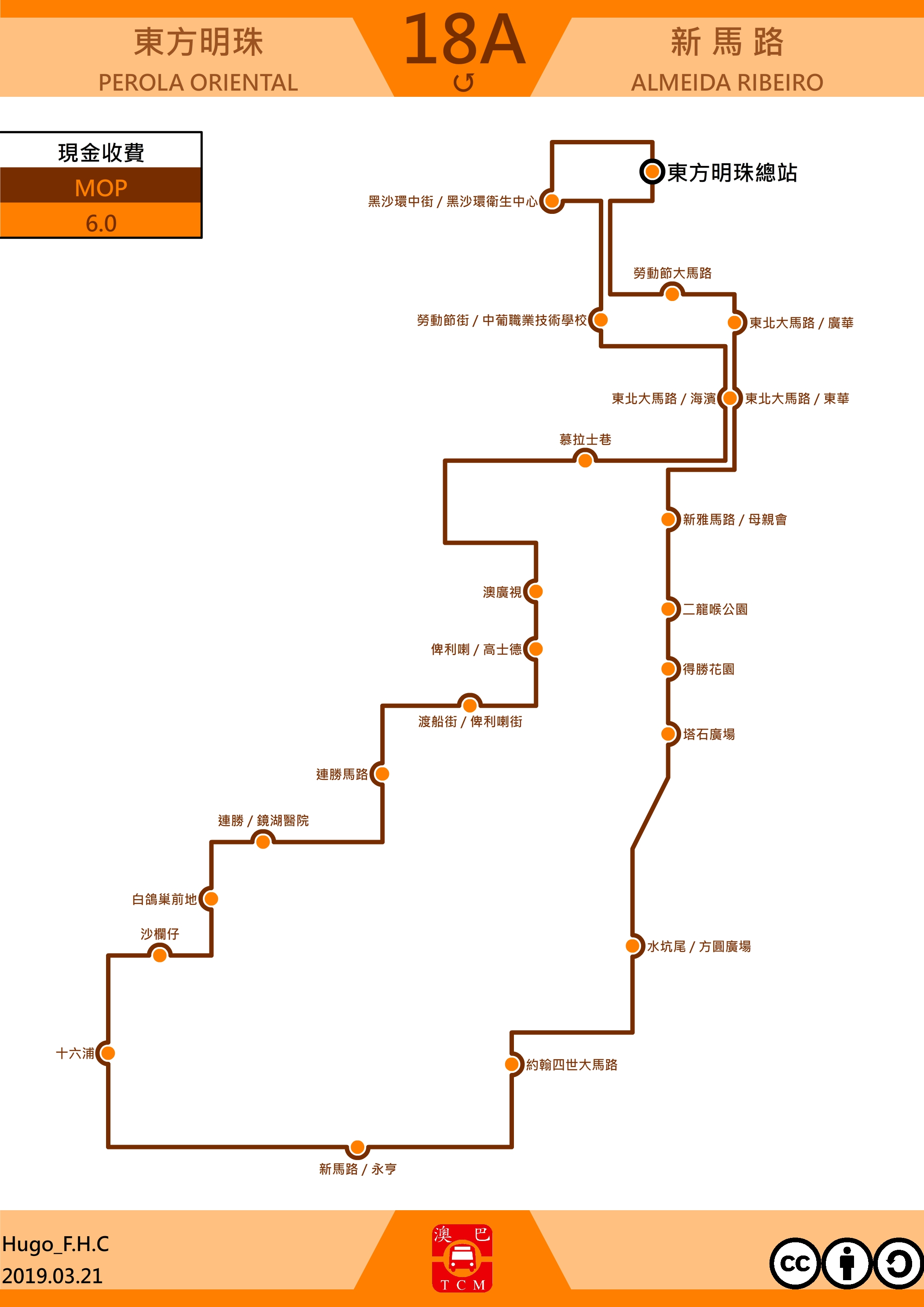 澳門巴士18A走妓圖